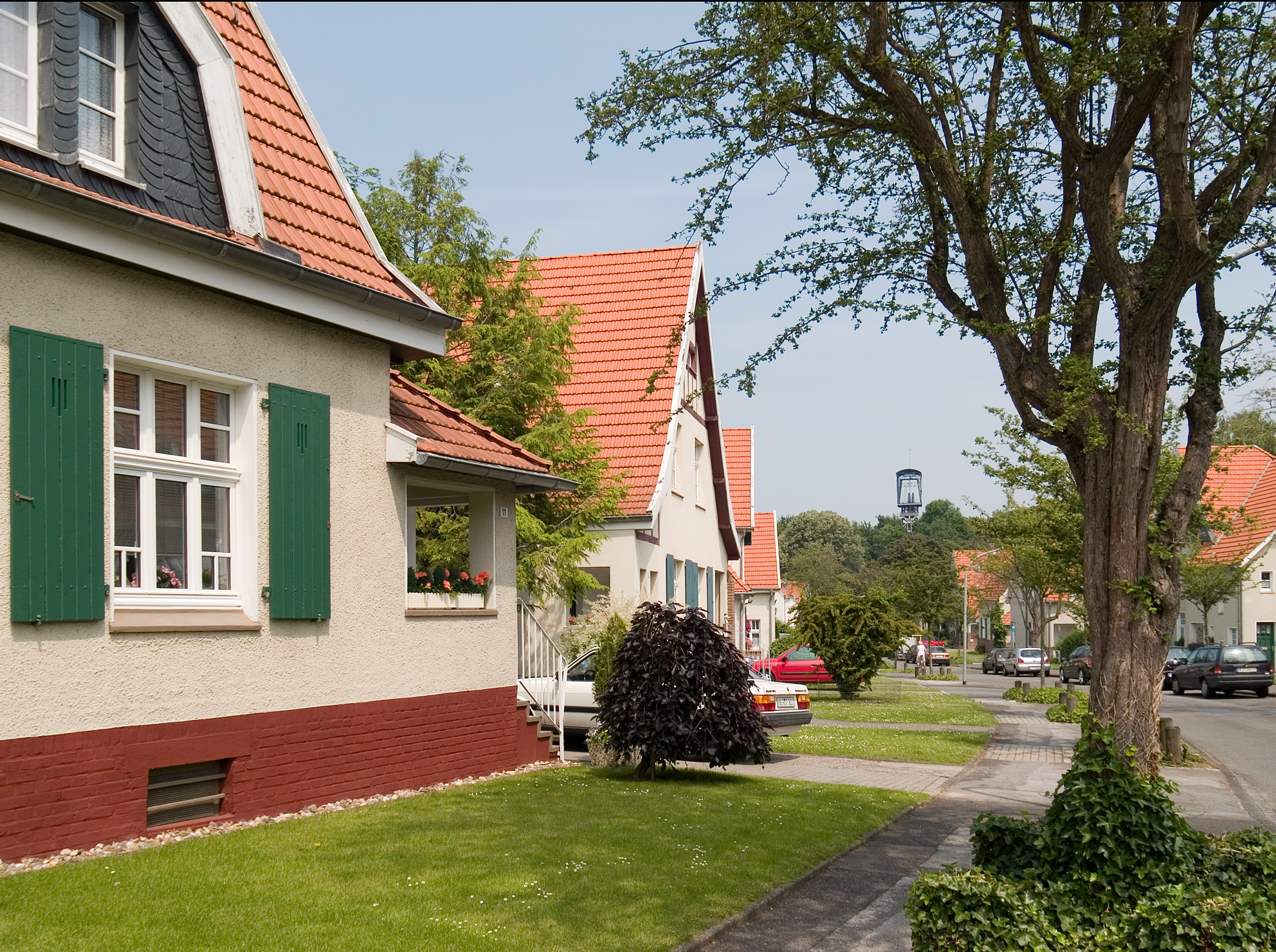 Herne, Straße in der Siedlung Teutoburgia. Im Hintergrund das Schachtgerüst der namensgebenden ehemaligen Zeche.